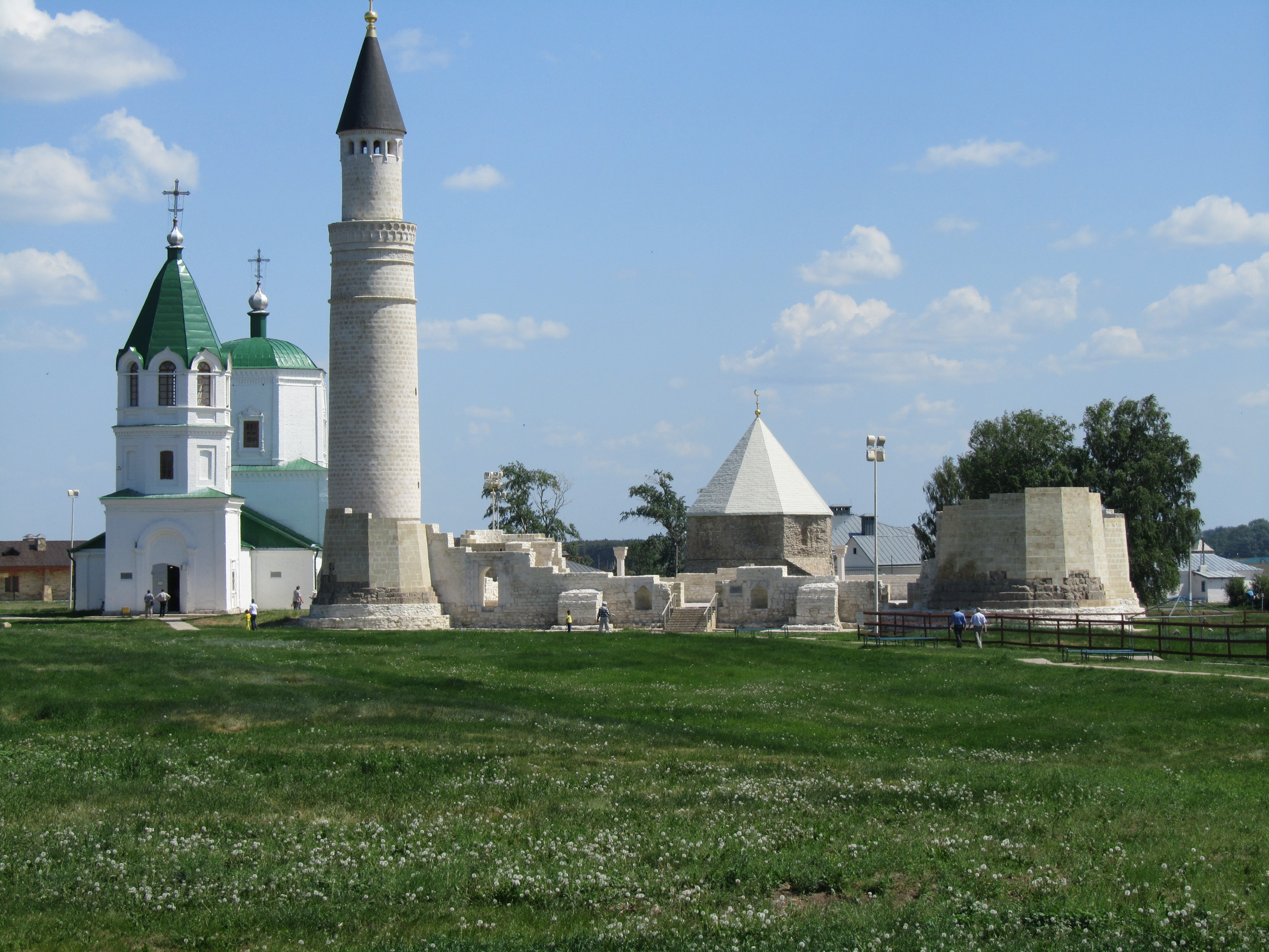 Комплекс памятников архитектуры XIII-XIV вв. на территории Булгарского городища (архитектурный комплекс «Болгары») (Республика Татарстан, Болгар, село Болгары, городище)